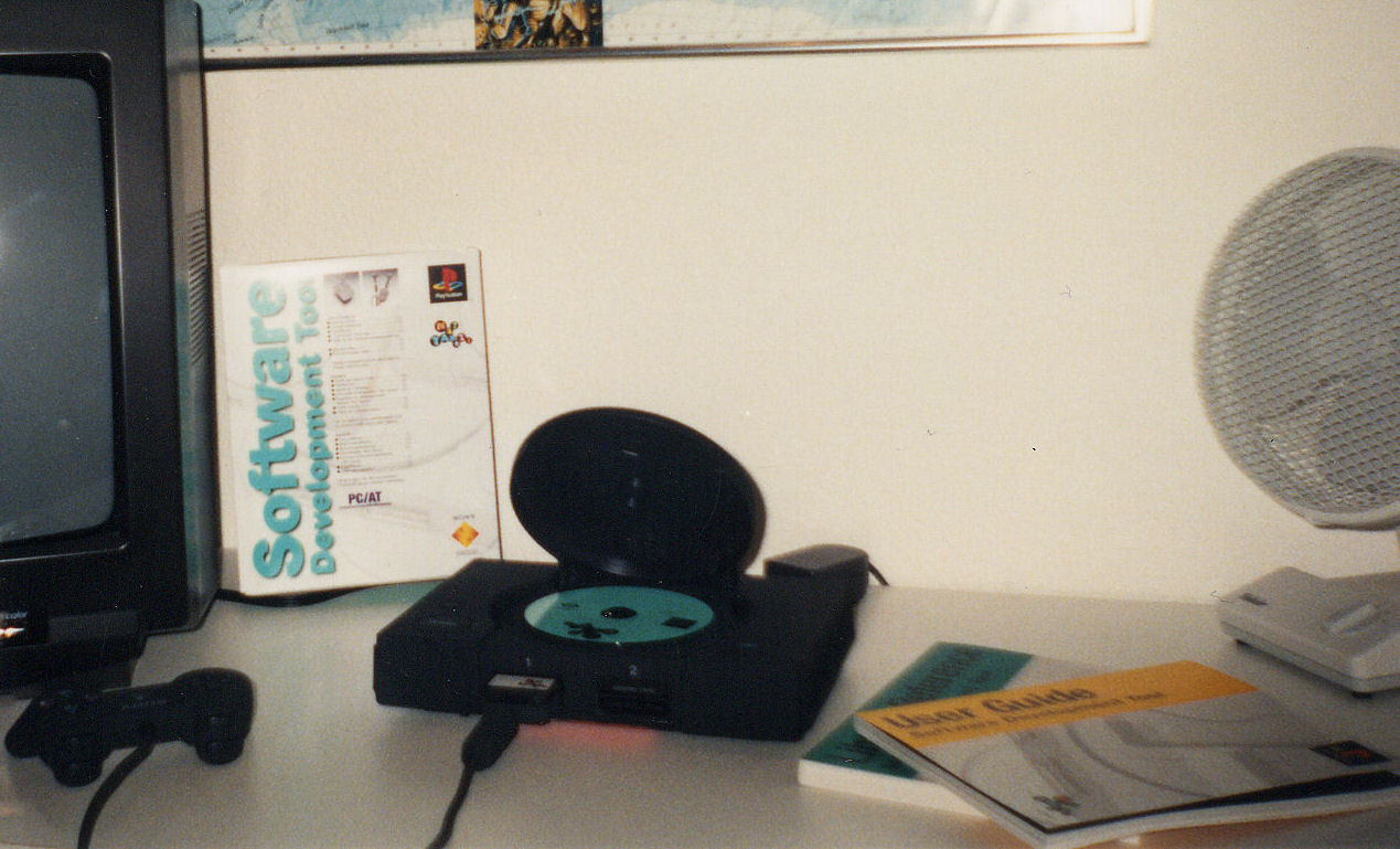 Sony Net Yaroze mit original Yaroze-SDK und Programmierhandbüchern